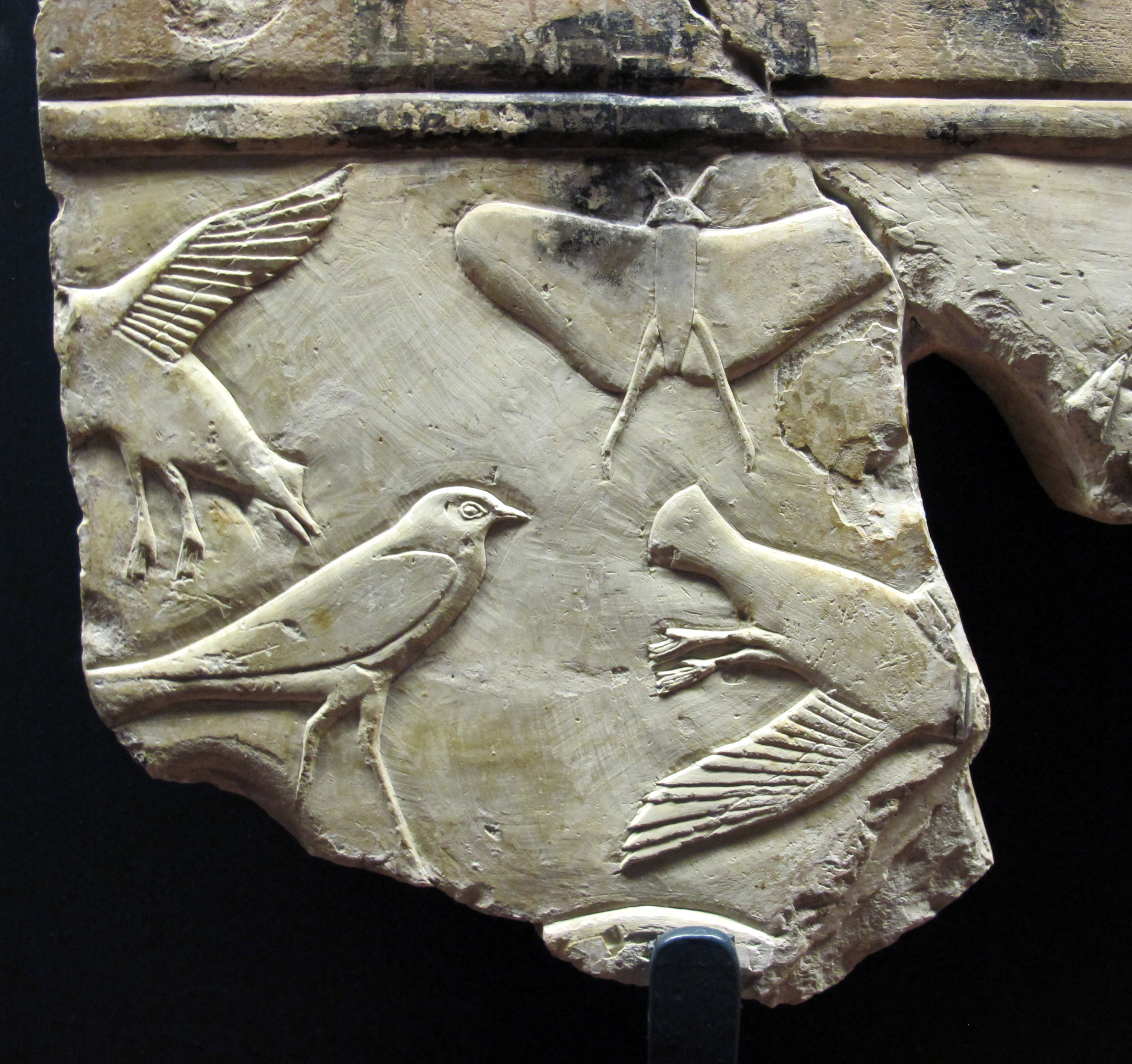 Museo Gregoriano Egizio